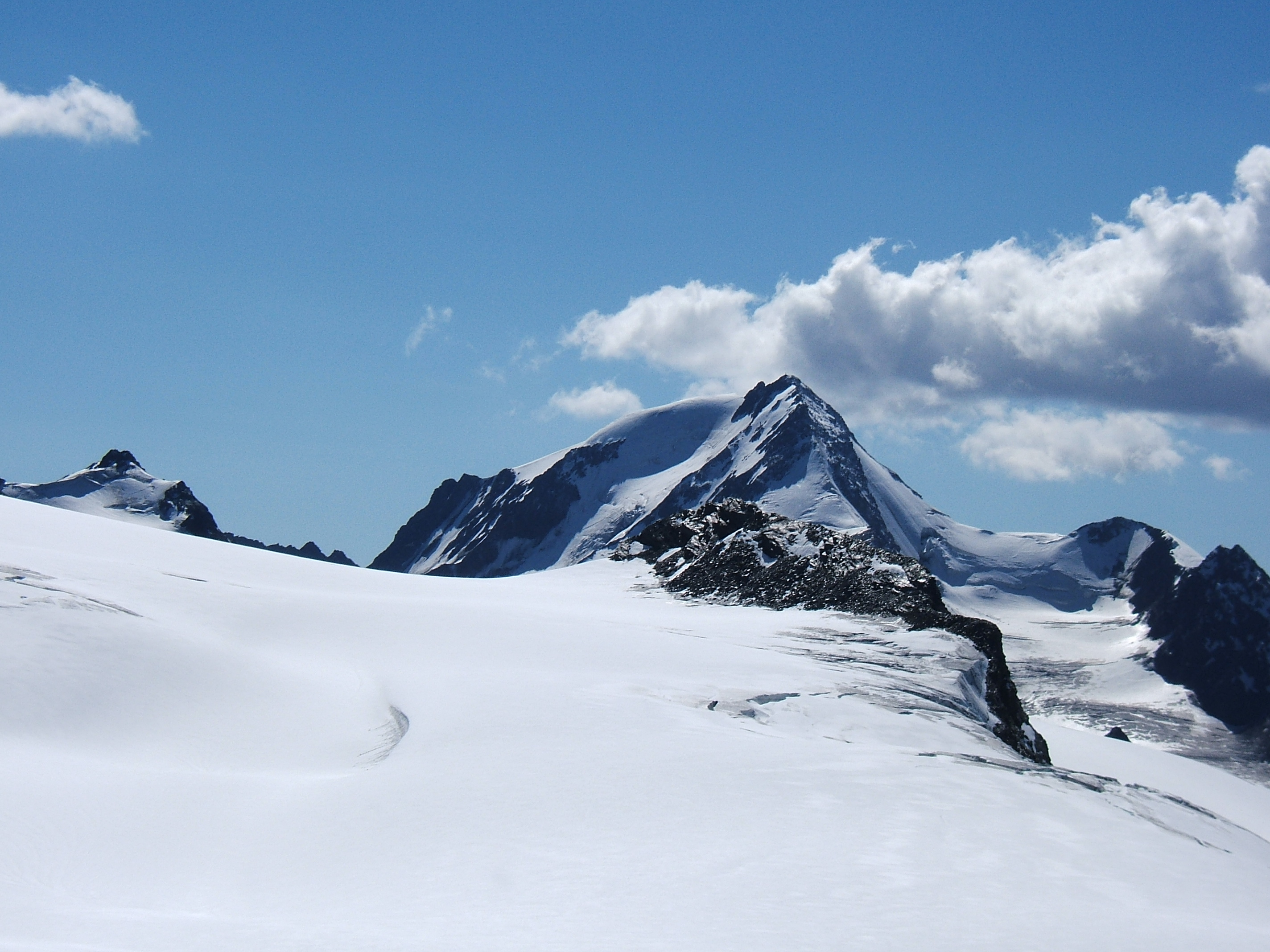 Weißkugel von Norden, vom Brandenburger Haus.